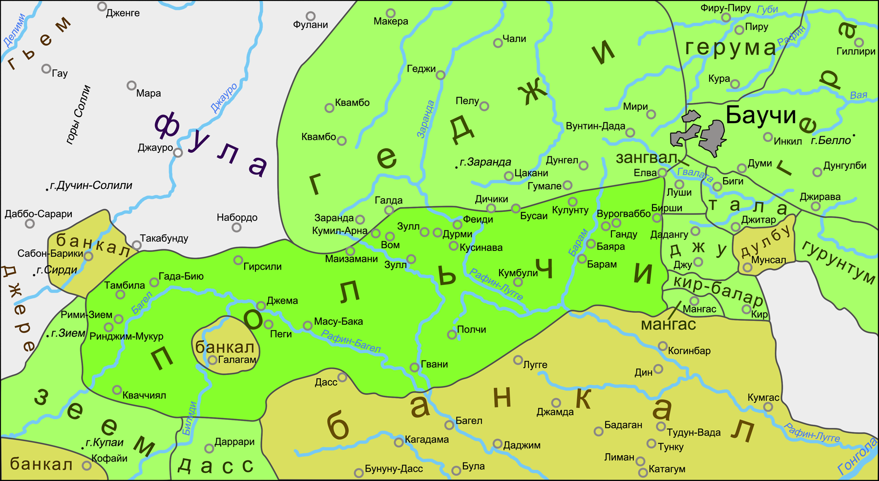 Ареал западночадских языков кластера польги. Источники: Lewis, M. Paul, Gary F. Simons, Charles D. Fennig: Nigeria, Map 3. Ethnologue: Languages of the World (19th Edition). Dallas: SIL International (2016); Caron, Bernard. Number in South-Bauchi-West Languages. Number in Africa and Beyond: Grammar, Semantics and Social Deixis., Sep 2011, Cologne, Germany. P. 2. Lyon: Archive ouverte en Sciences de l'Homme et de la Société (2011).